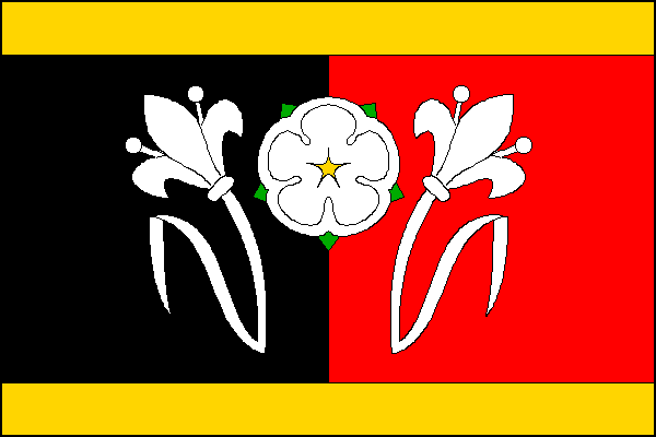 vlajka, Krchleby, okres Šumperk